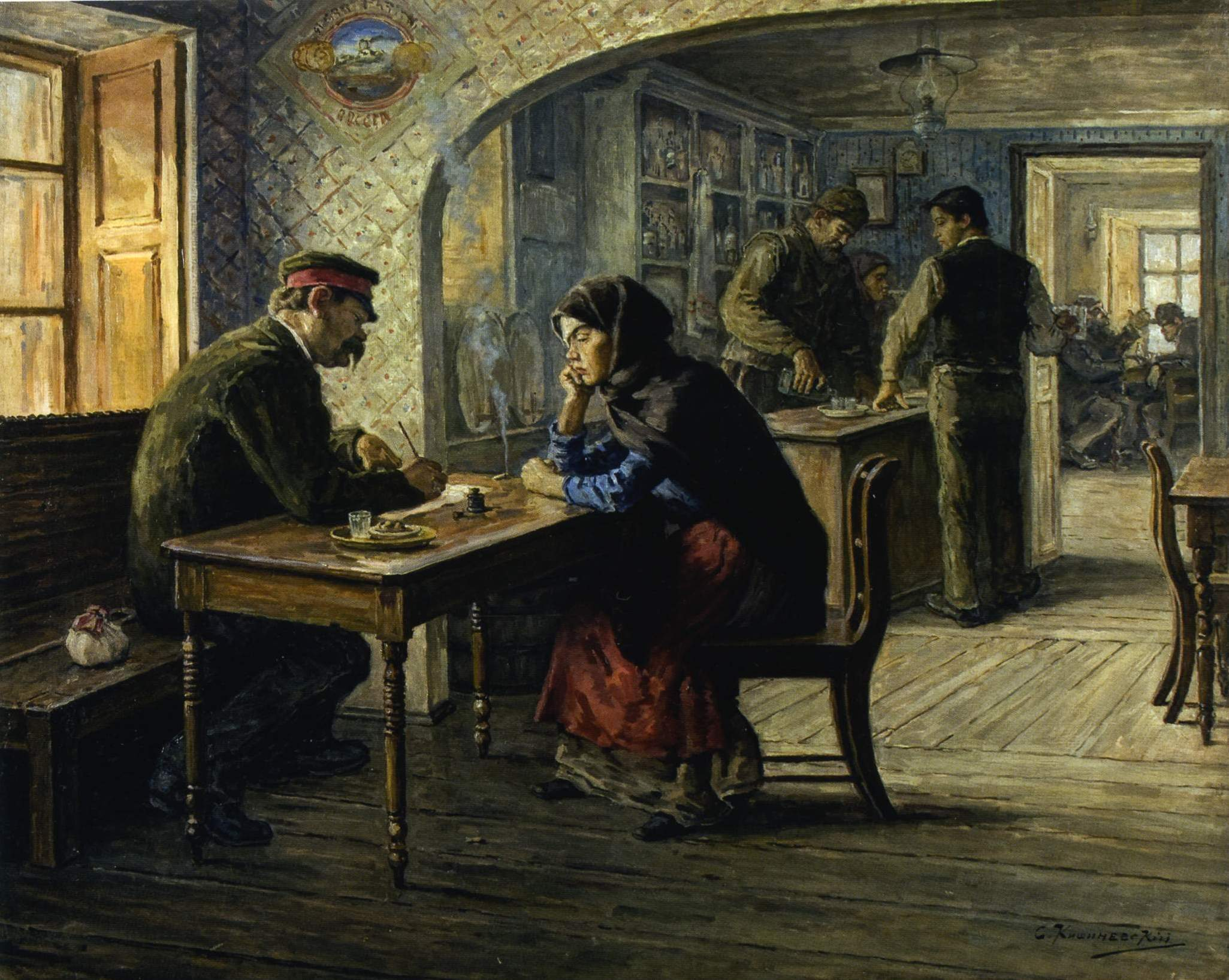 "Прошение" (1893), 72 х 94 В собрании Государственной Третьяковской галереи. Произведение записано в инвентарной книге ГТГ под номером 1790. Дар П. М. Третьякова в 1893 г. Приобретена у автора. Уменьшенный вариант картины находится в частном собрании в Киеве.